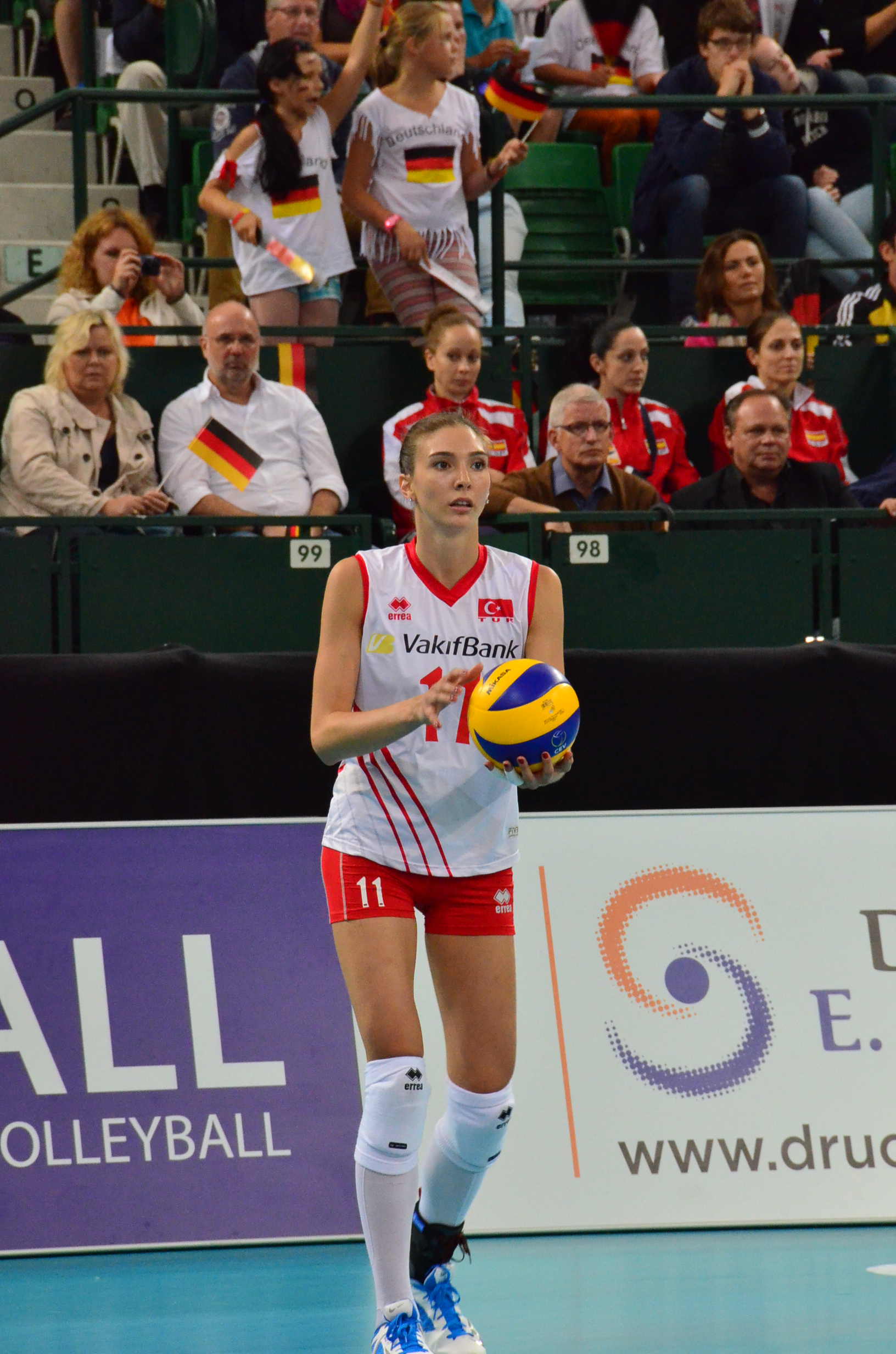 Volleyball-Europameisterschaft der Frauen 2013-Spielort Halle (Westf) Gerry-Weber-Stadion - Spiel 8. September 2013 (Deutschland-Türkei)